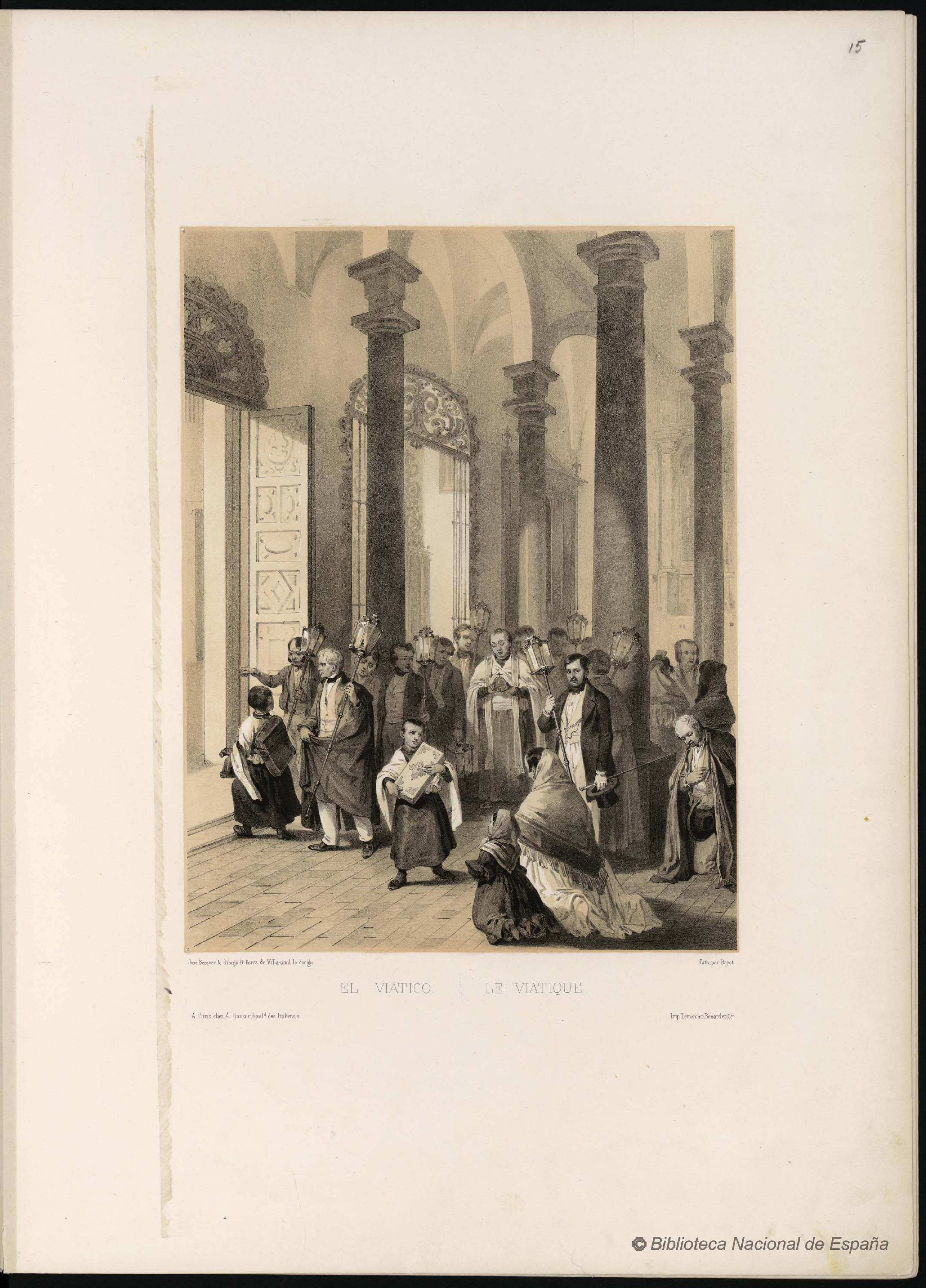 El Viático. De España artística y monumental, Genaro Pérez de Villa-Amil. París, 1842-1844, 3 tomos.